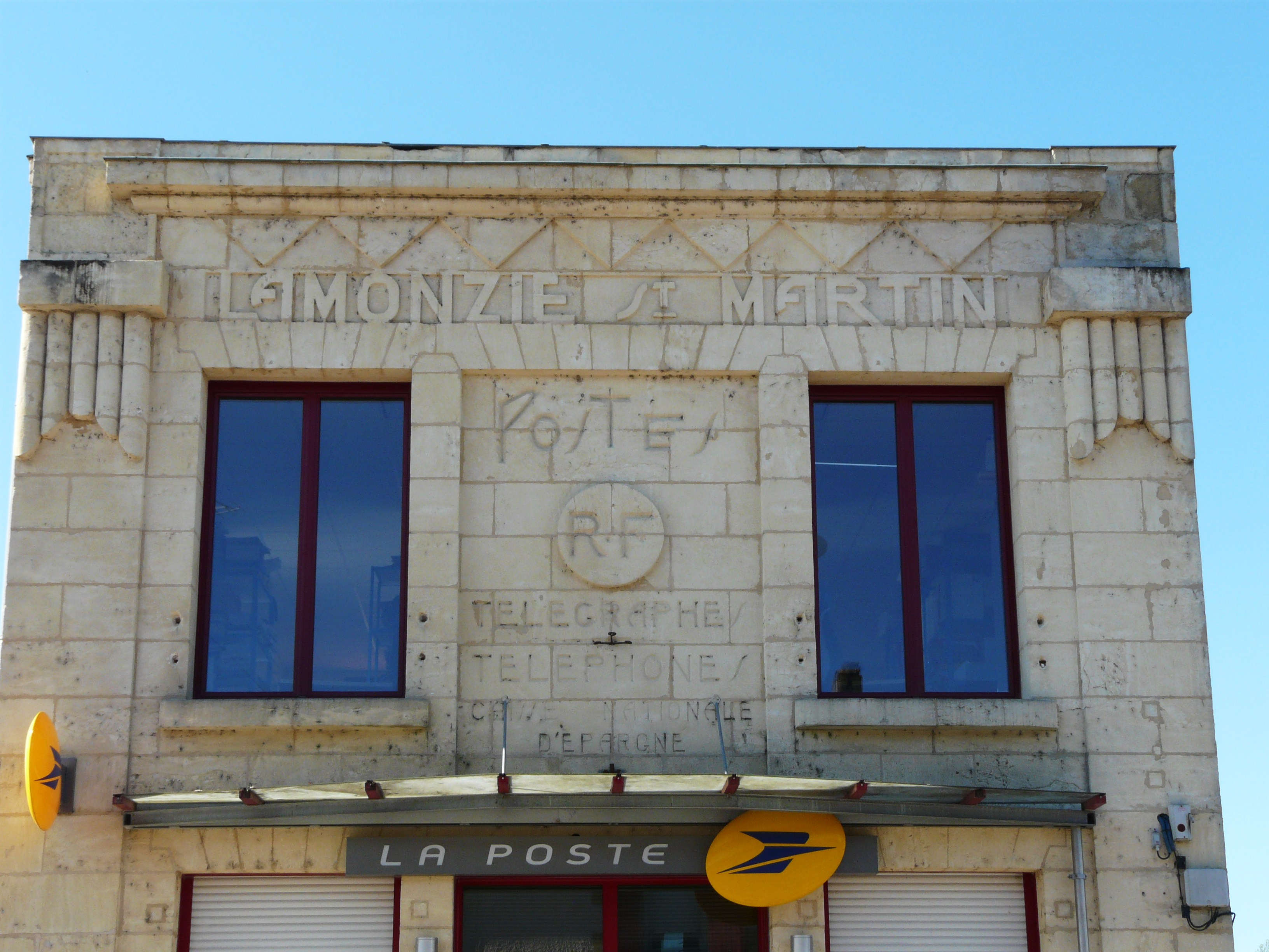 Façade du bureau de poste de Lamonzie-Saint-Martin, Dordogne, France.